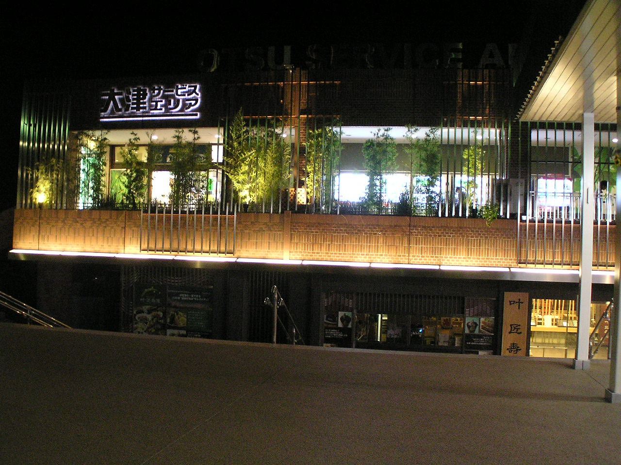 大津サービスエリア